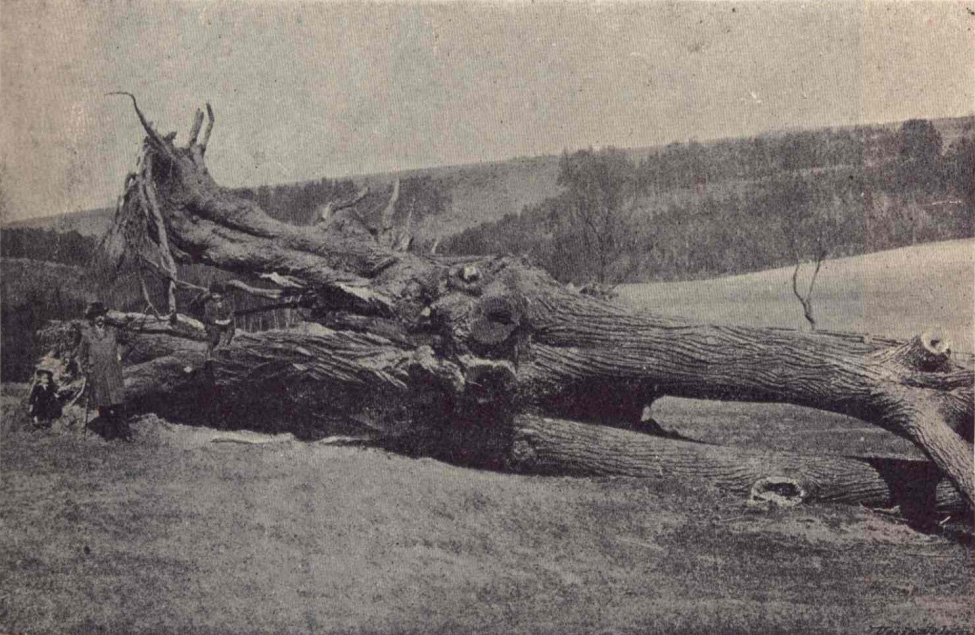 Komenského lípa na Babí u Náchoda, památný strom, padla roku 1901